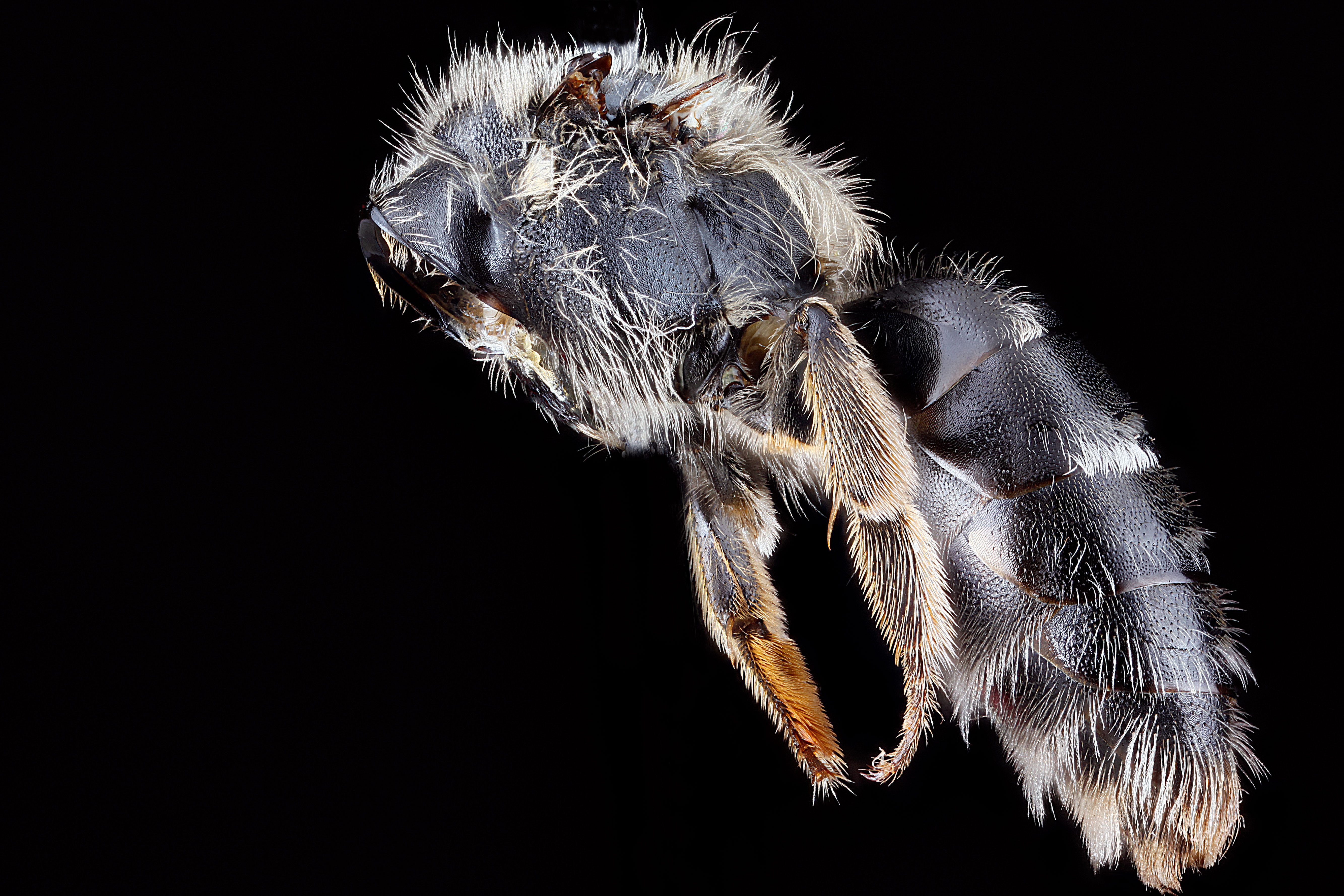 Andrena-cresonii,-female,-pronotal-collar,-side_2012-07-19-16.27.59-ZS-PMax